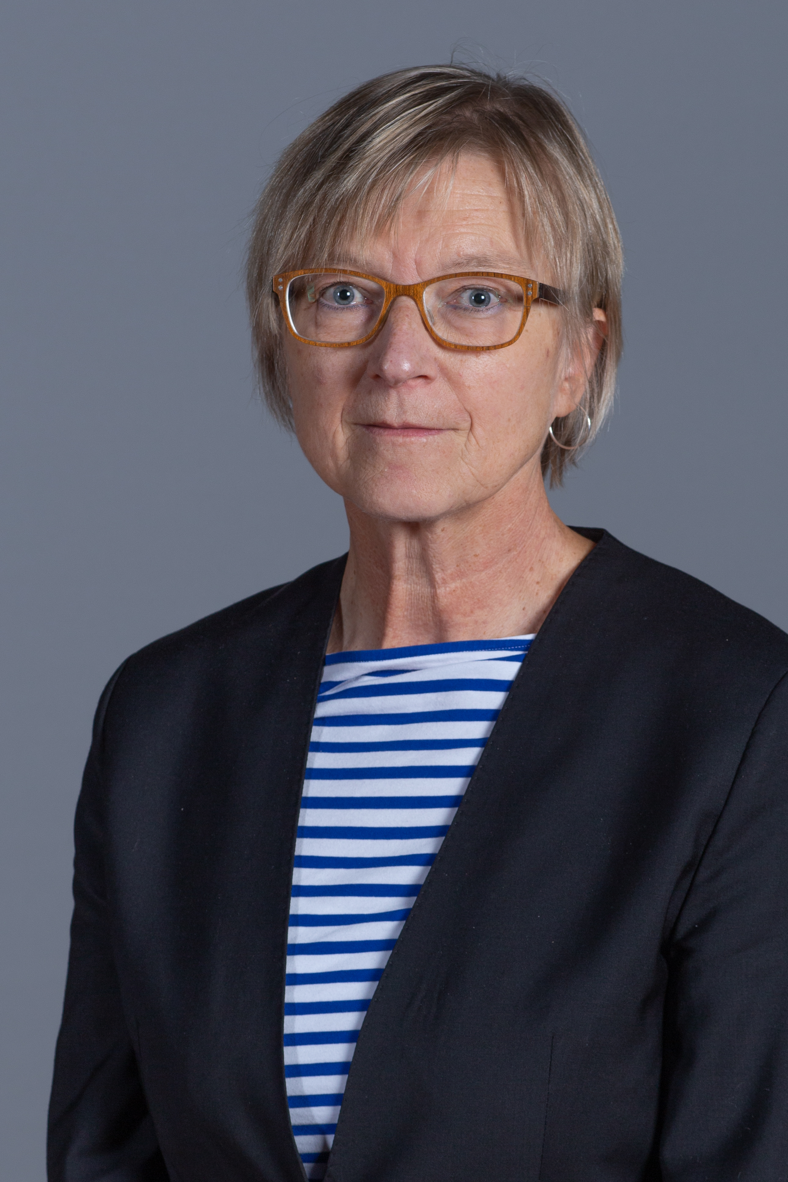 Abgeordnete(r) der Bürgerschaft der Freien und Hansestadt Hamburg Antje Möller